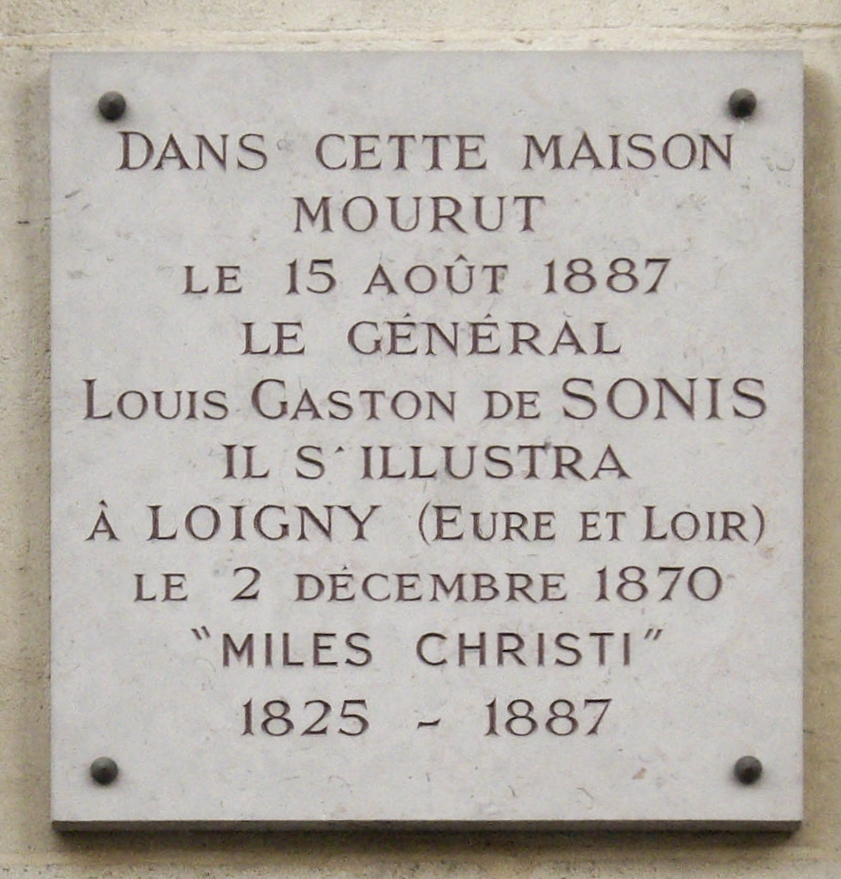 Plaque commémorative, 2 rue de Sontay, Paris 16e. « Dans cette maison mourut le 15 août 1887 le général Louis-Gaston de Sonis. Il s'illustra à Loigny (Eure-et-Loir) le 2 décembre 1870. Miles Christi. 1825-1887. »